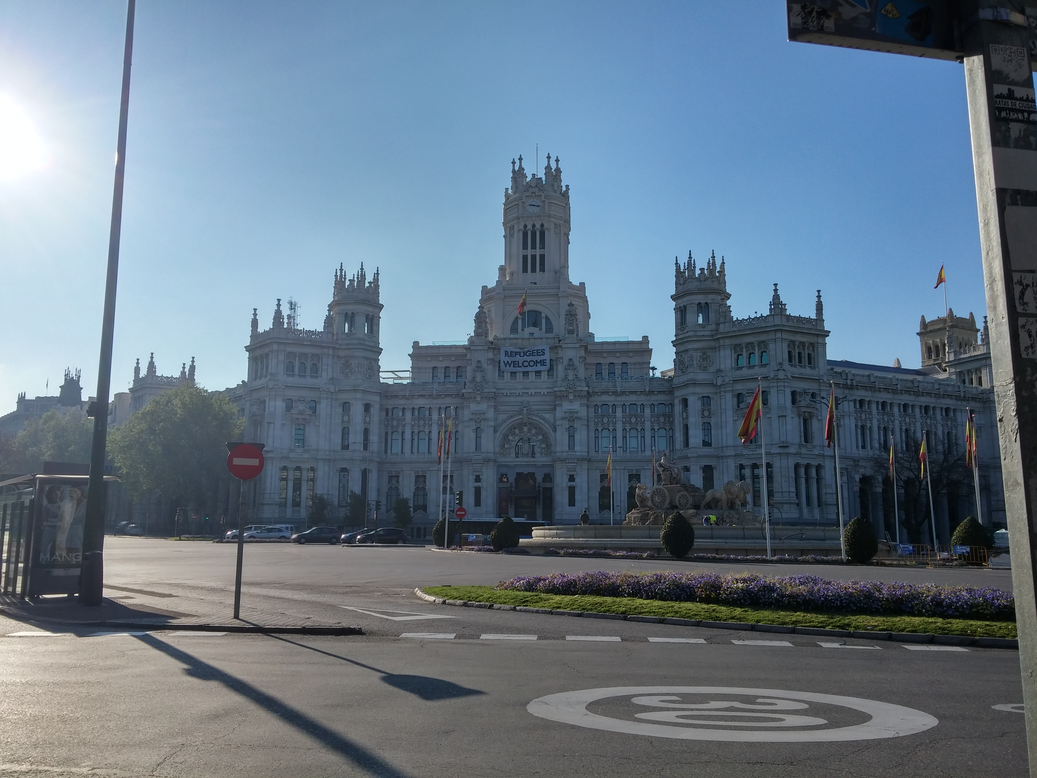 Pałac Komunikacji w Madrycie